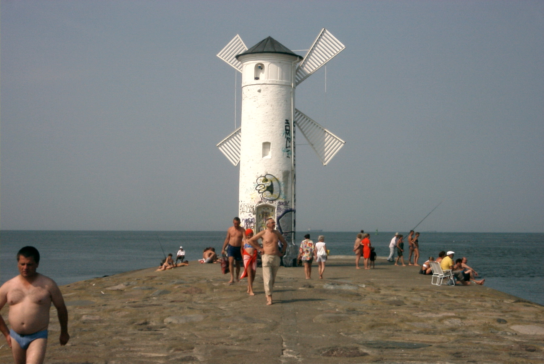 Stawa Młyny, Świnoujście.